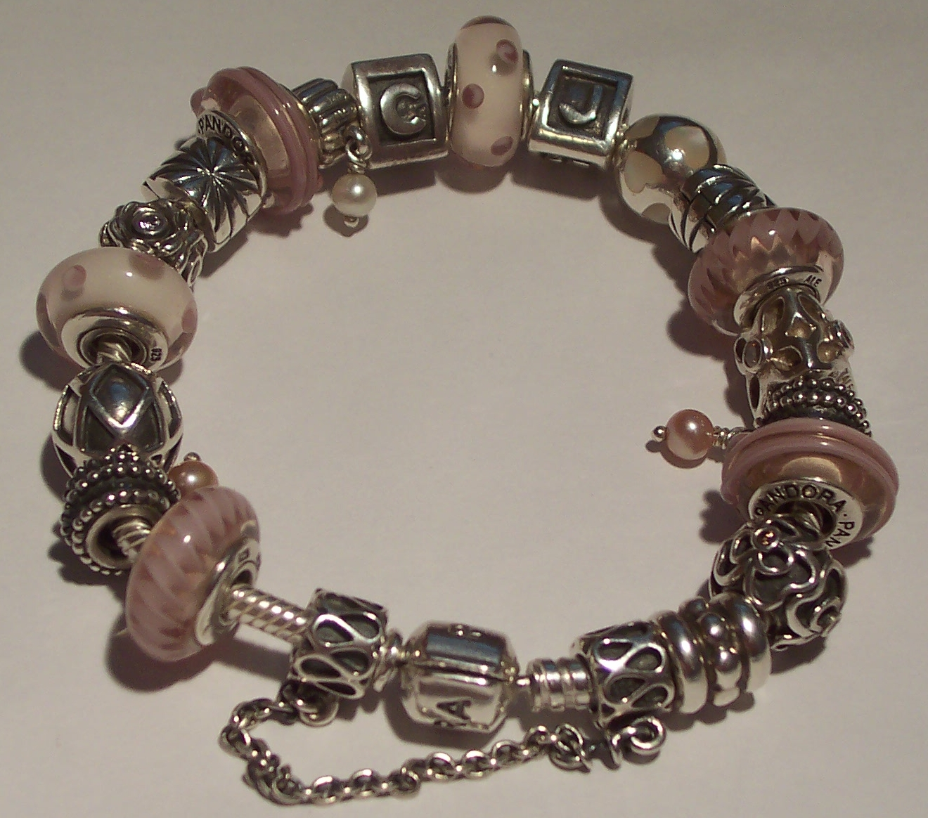 A Pandora bracelet